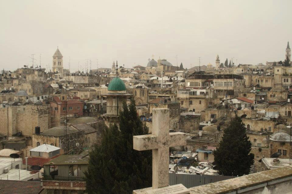 Dachterrasse in der Altstadt von Jerusalem